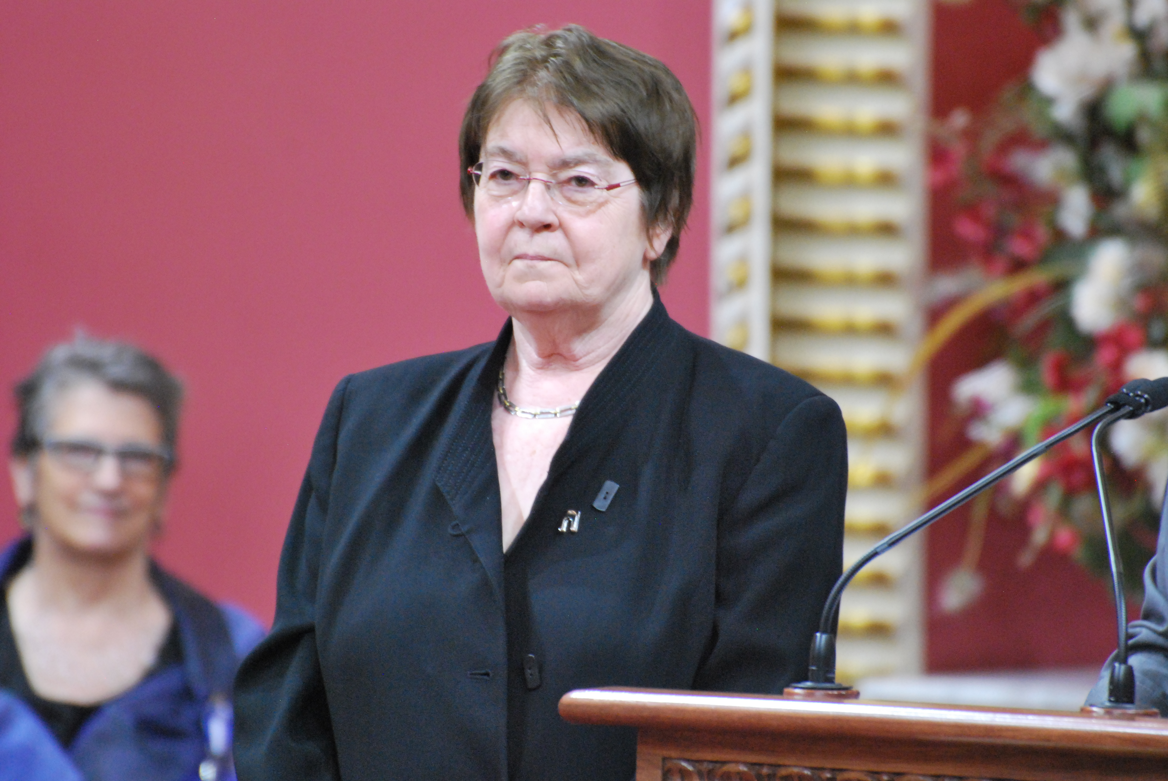 Cérémonie de remise de l'ordre national du Québec 2013. Nicole Brossard